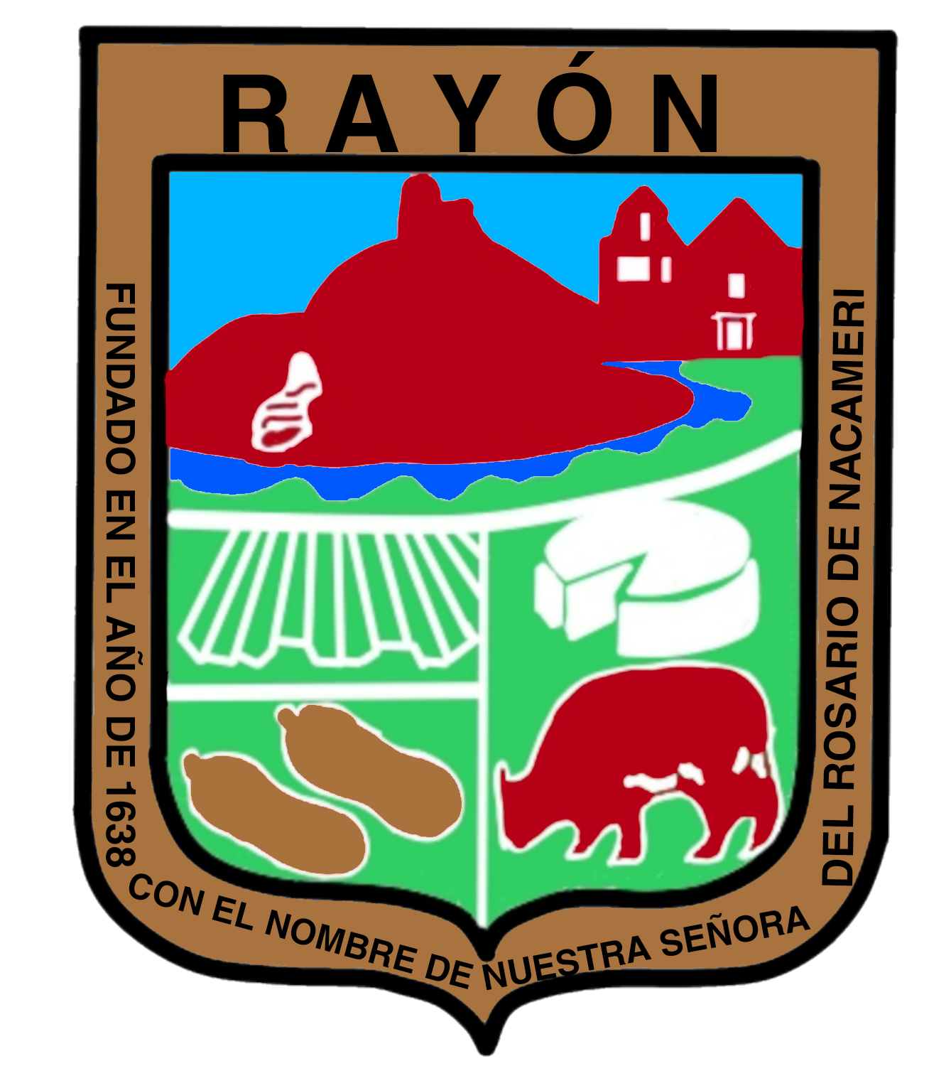 Escudo de armas oficial del municipio de Rayón, Sonora.